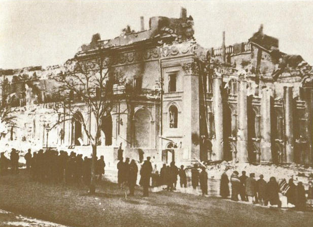 1-а одеська опера після пожежі: фото 1-ї одеської опери